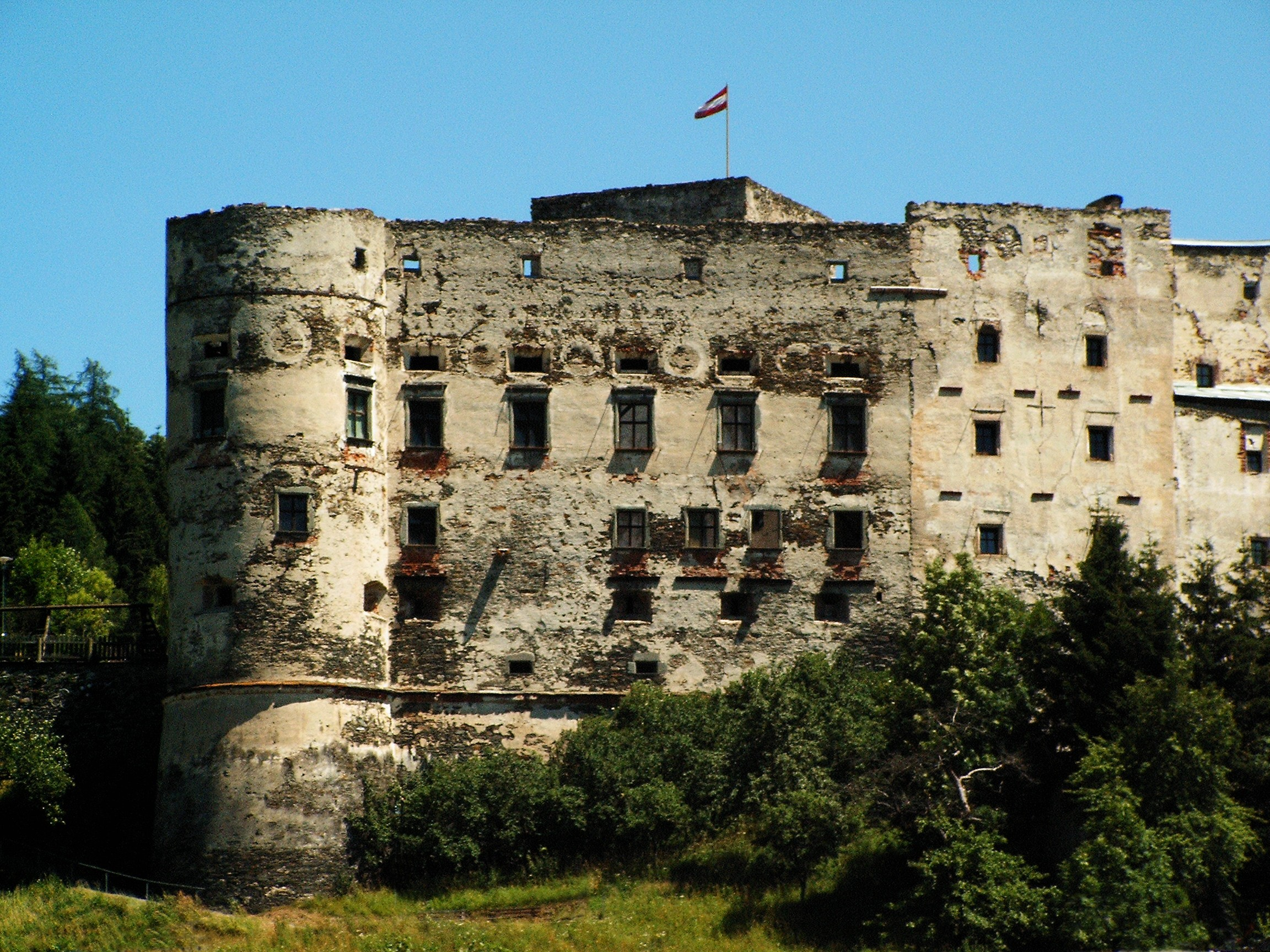 Burg in Gmünd / Kärnten